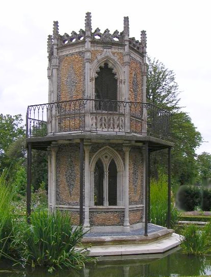 Pavillon gothique du jardin public de Cognac, Charente, France